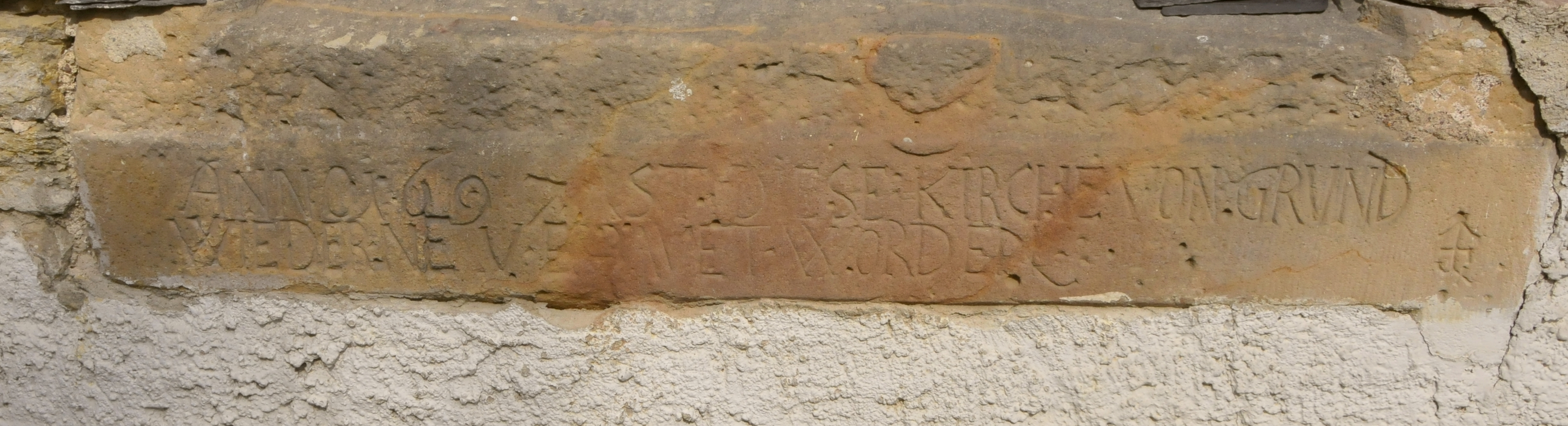 Gügleben, Kirche, Fensterbank mit Gründungsdatum